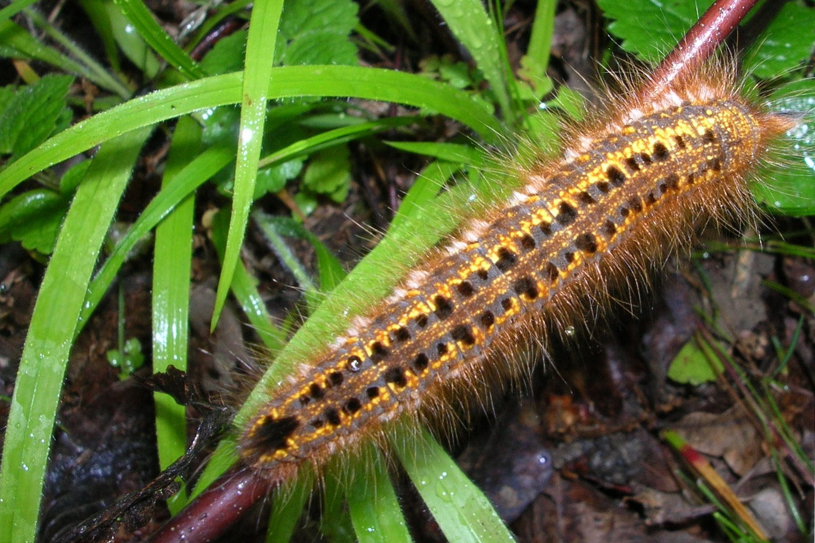 Chenille en forêt de Blettange